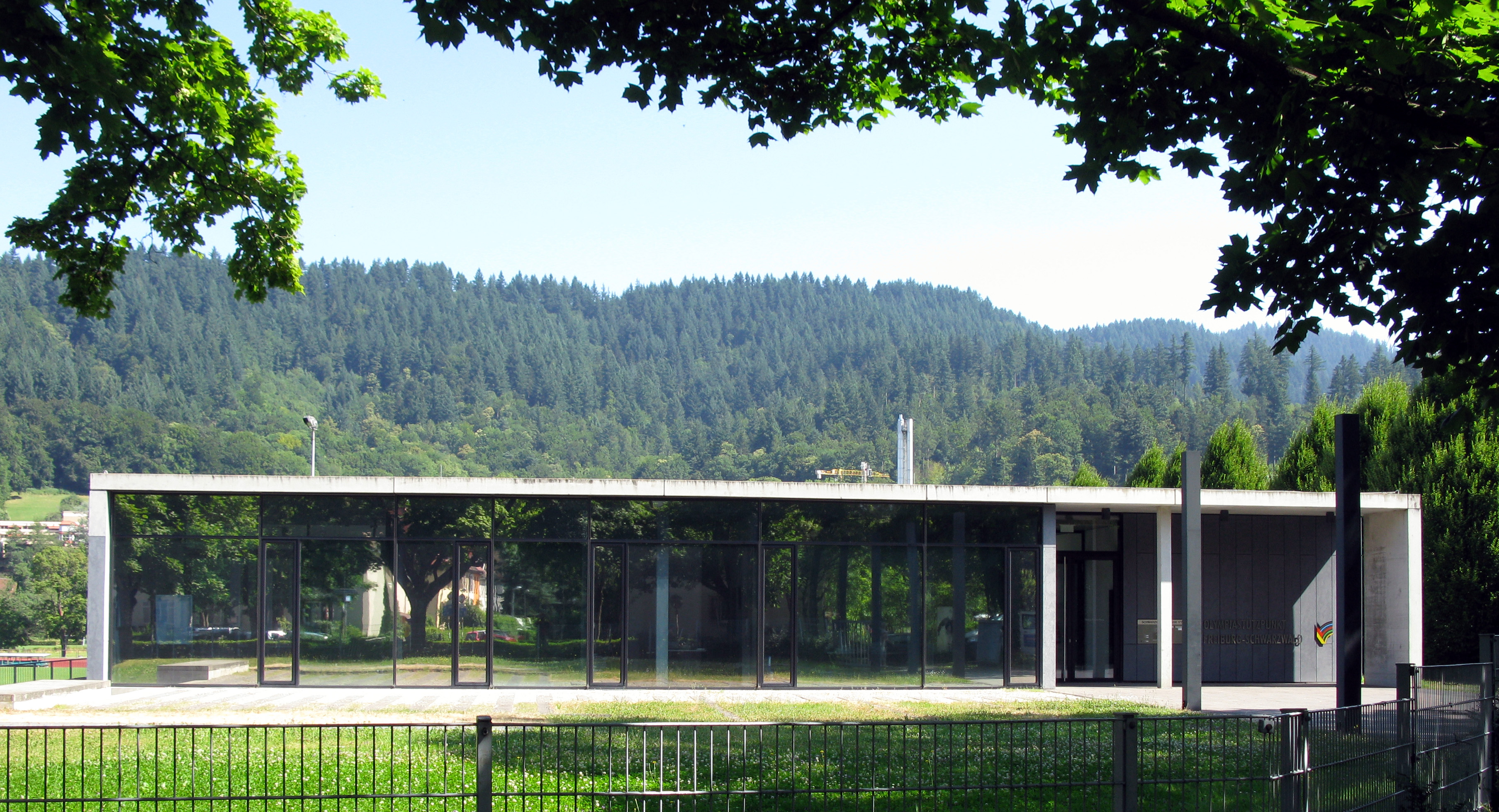 Olympiastützpunkt Freiburg-Schwarzwald, Georg-Thoma-Haus